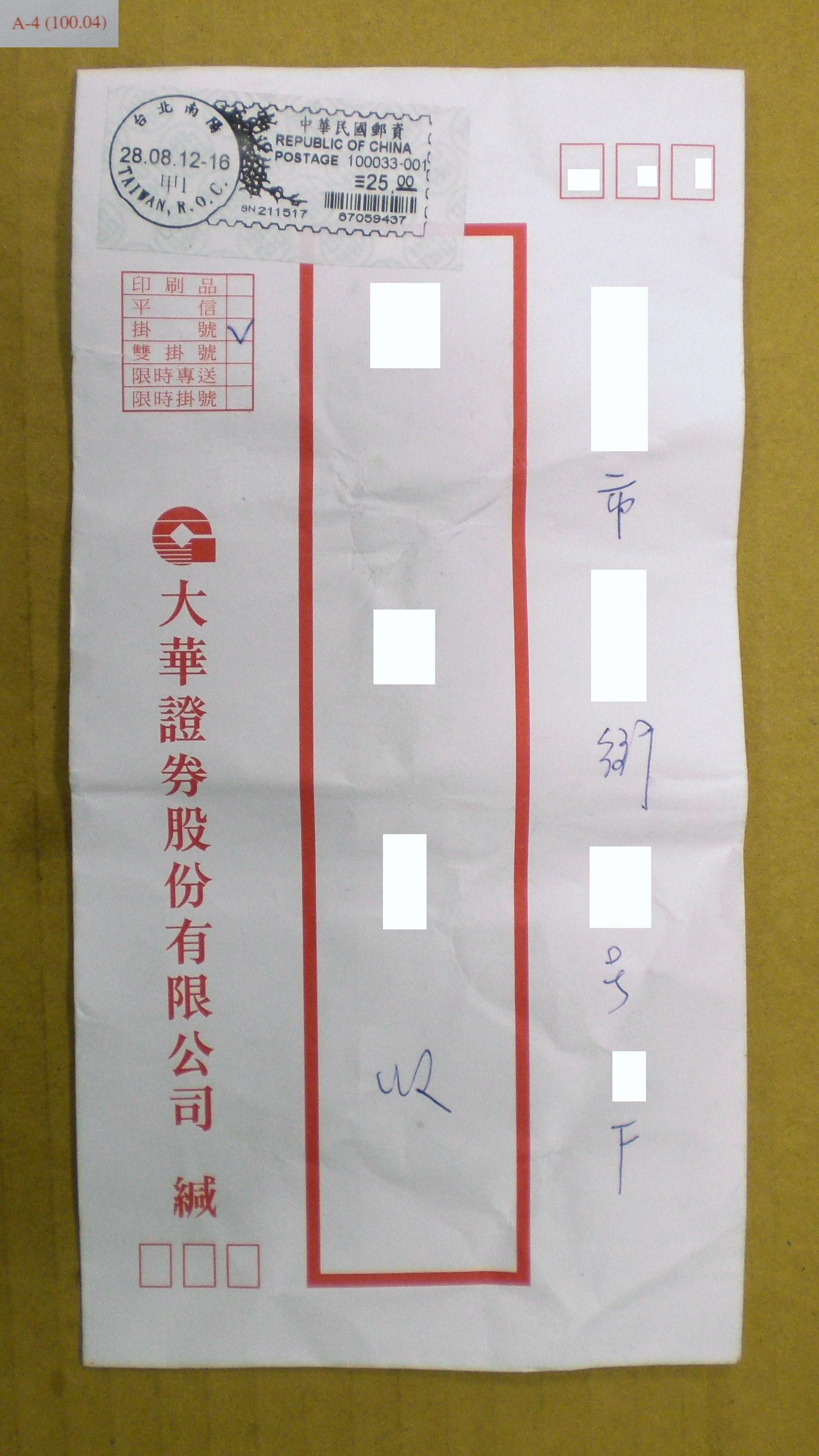 中文（台灣）: 大華證券A-4信封2011年4月版，左上角貼臺北南陽郵局印製的中華民國郵資貼紙。